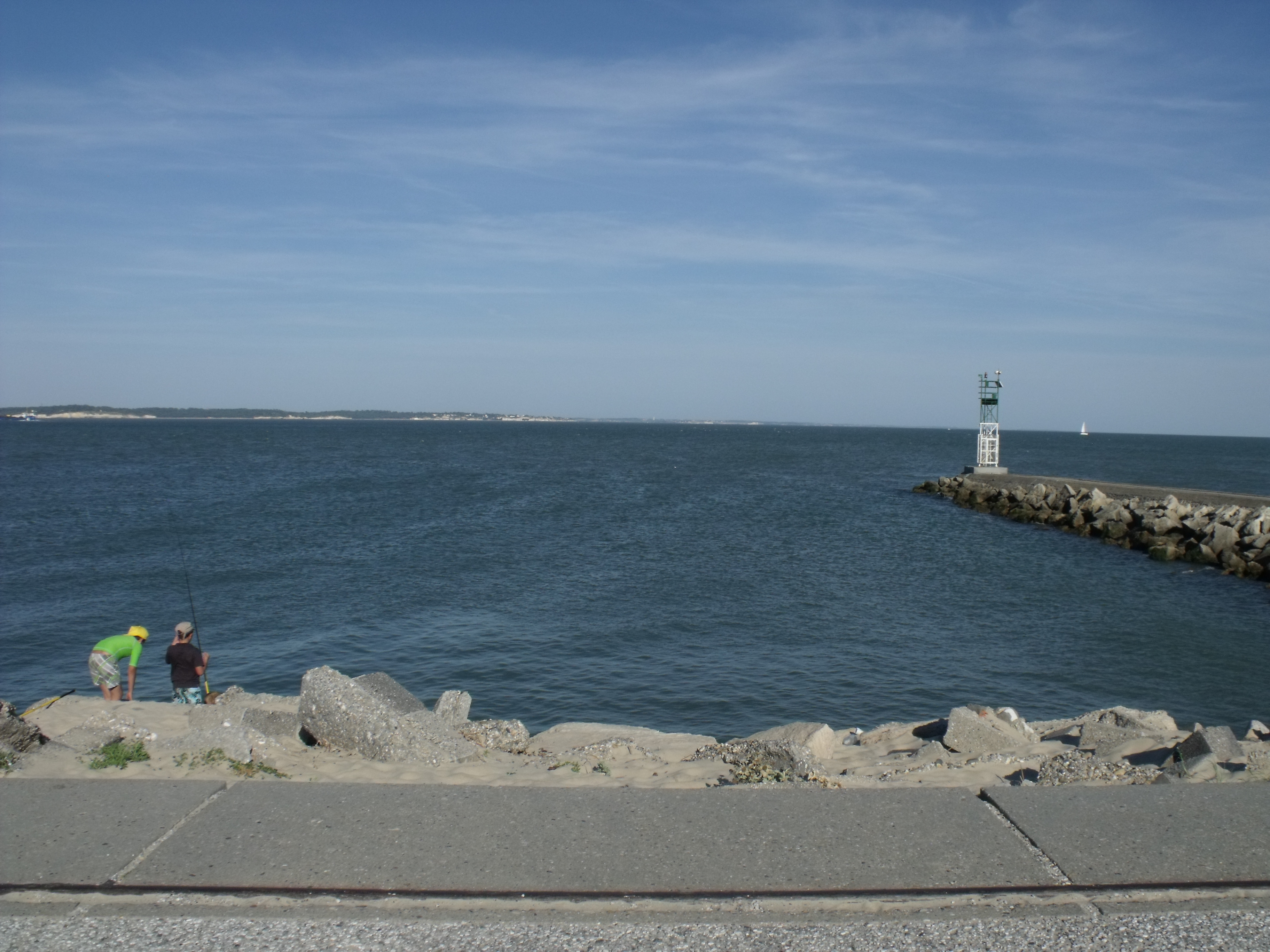 La Pointe de Grave, el lugar donde acaban el Médoc y la Gironda.